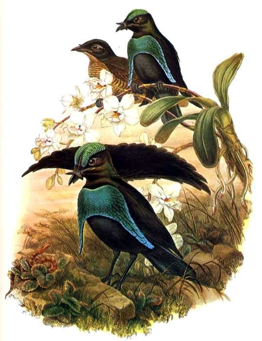 Lophorina superba